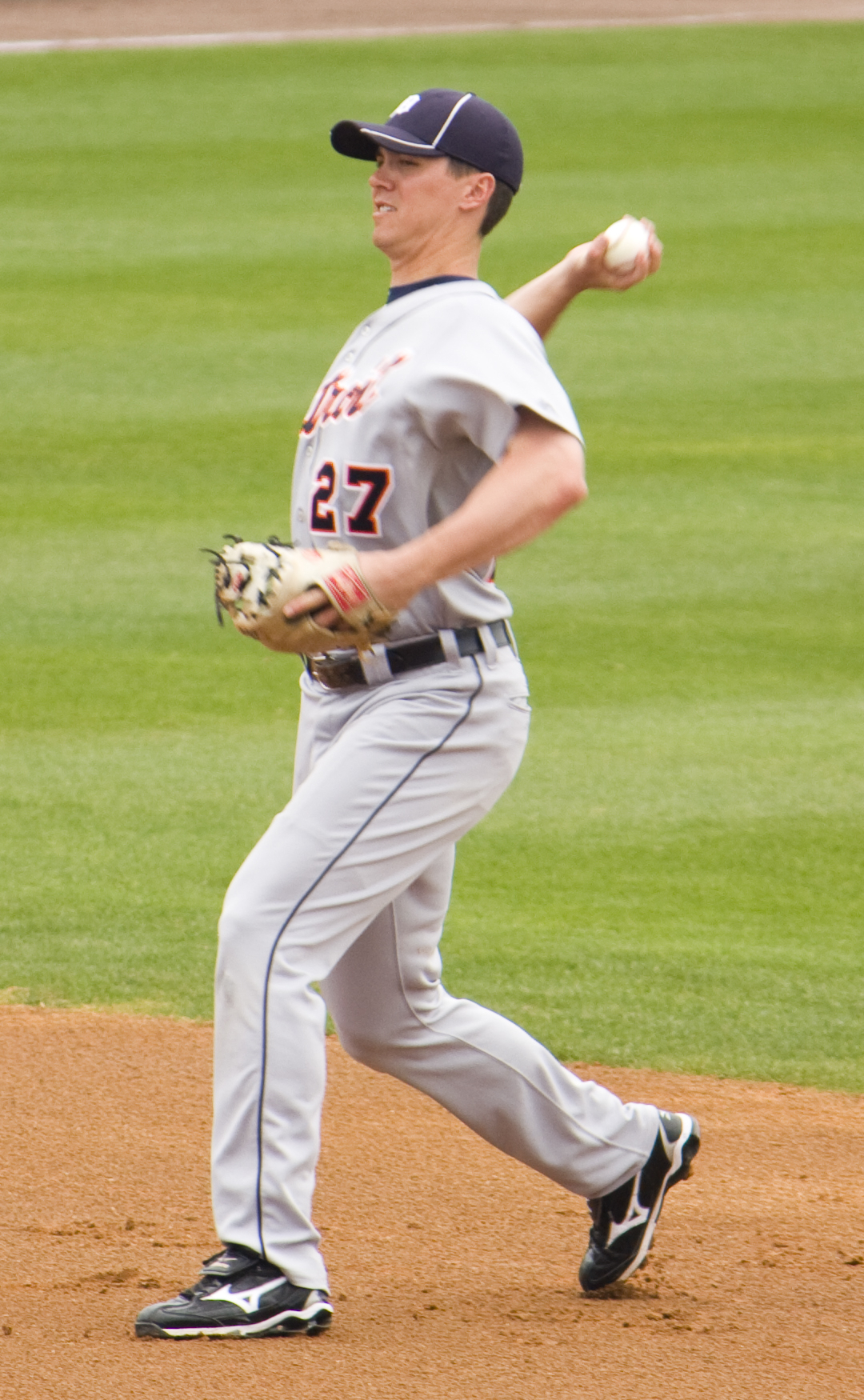 Brent Dlugach